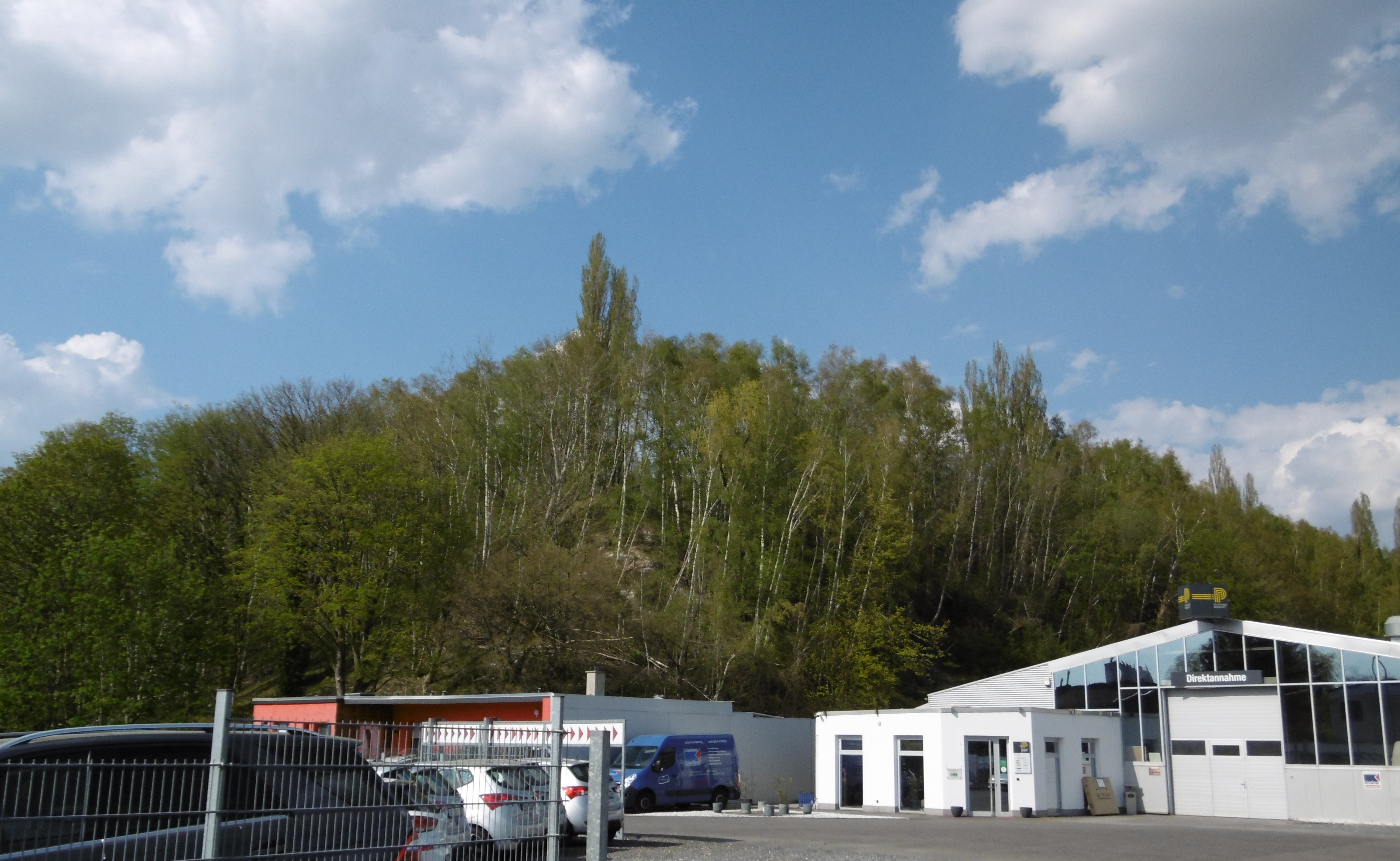 Rhenania-Halde, Stolberg-Atsch